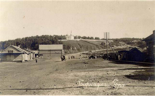 Нагорное клабдище, Барнаул